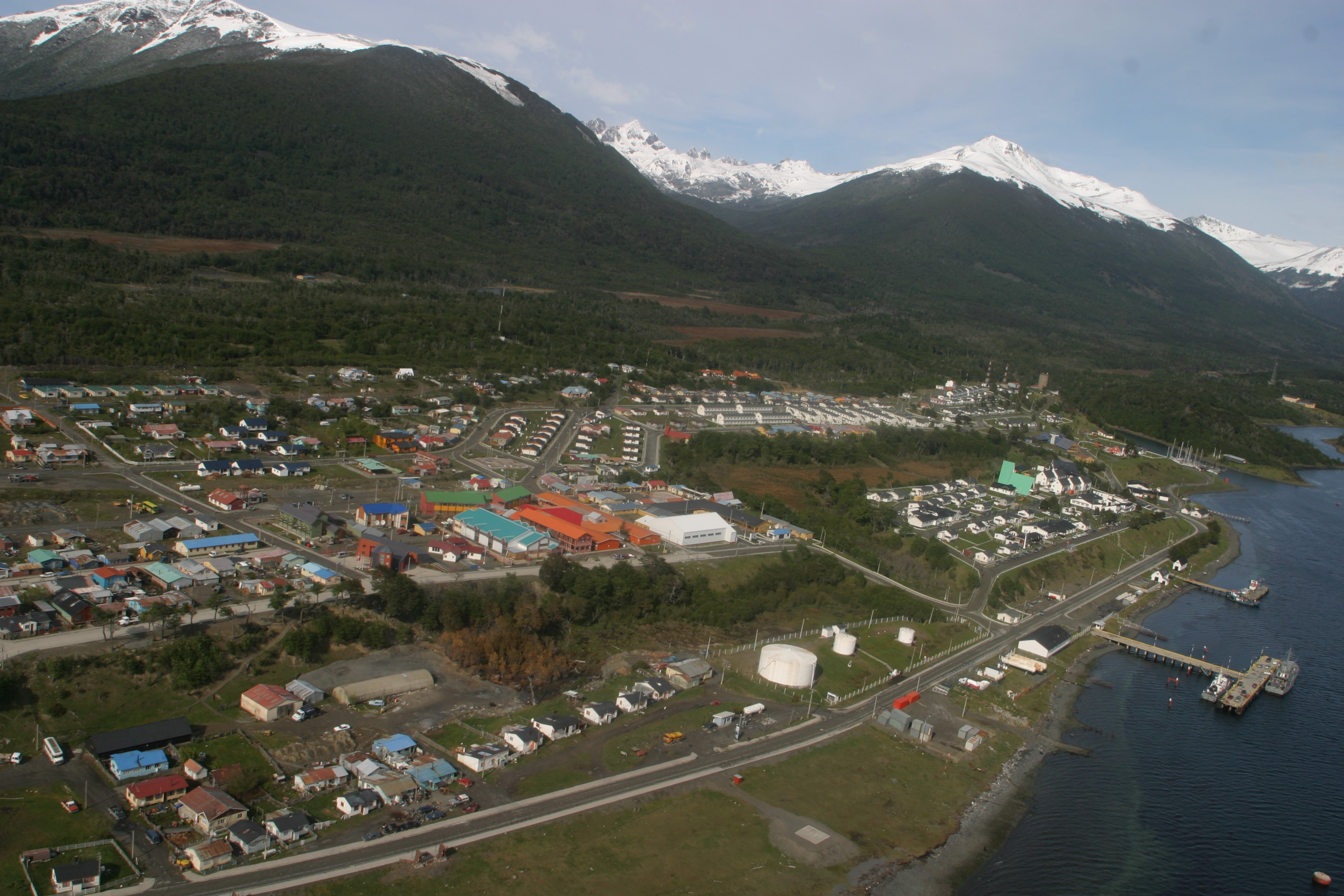 Comuna de Cabo de Hornos